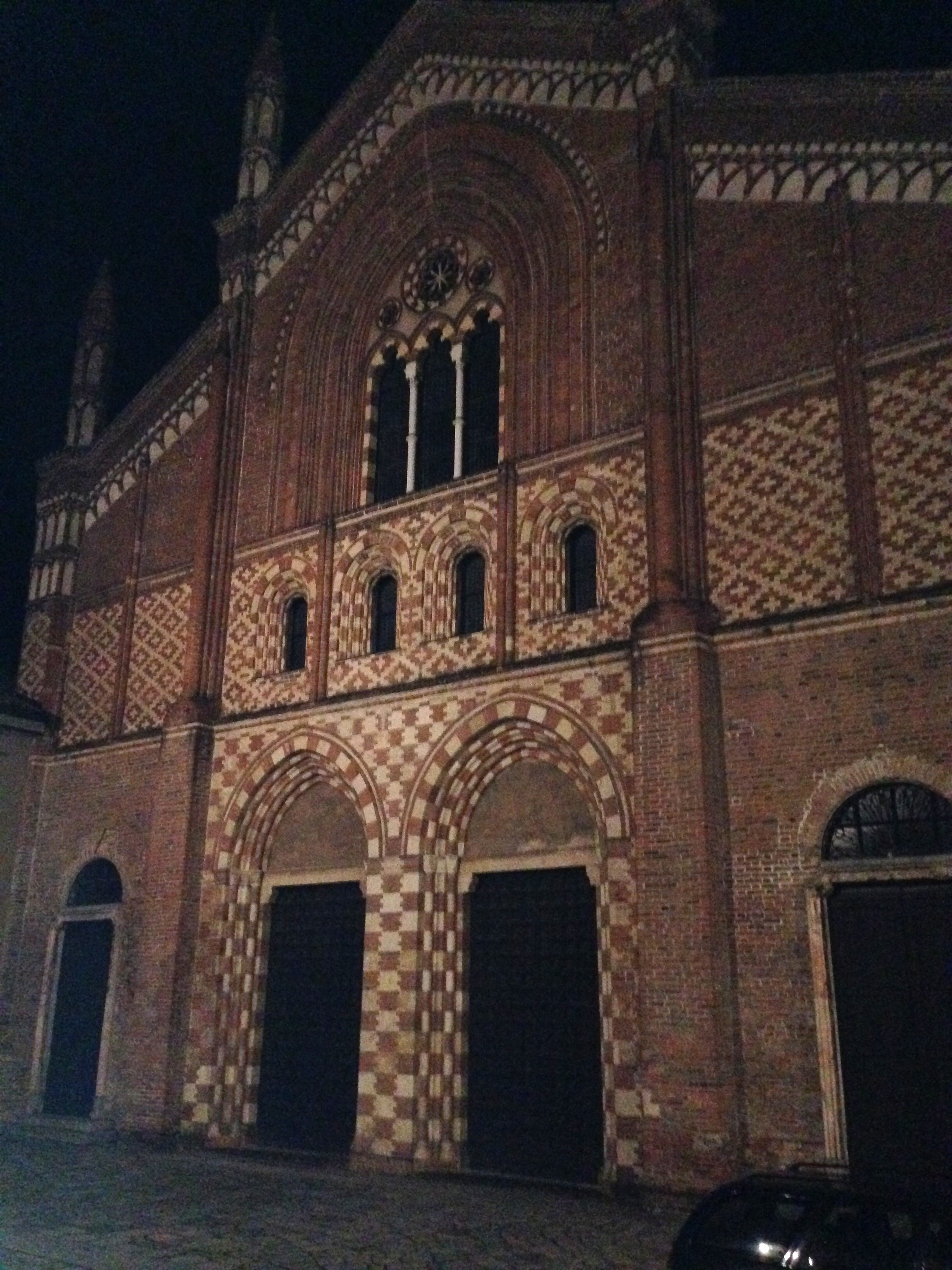 Foto notturna della facciata della chiesa di S. Francesco a Pavia